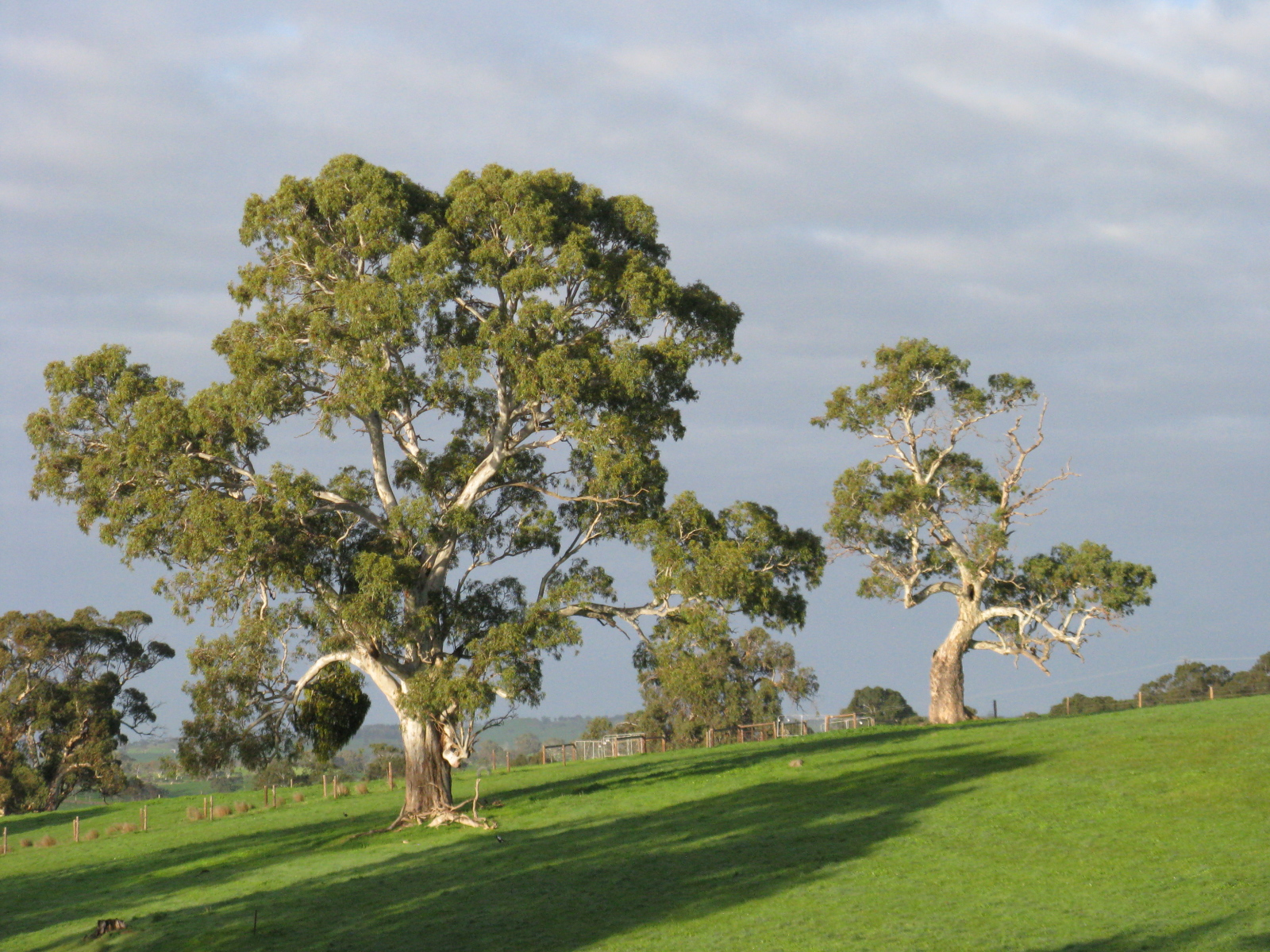 More trees